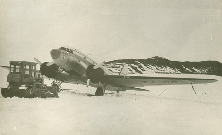 El 18 de septiembre de 1964, se inaugura el Servicio de Transporte Aéreo Militar a la Antártida con el Douglas C-47, matrícula TA-05. Despega a las 7.40 hs de Río Gallegos y seis horas después aterriza sobre esquís en la Base Matienzo. La tripulación estaba integrada por el vicecomodoro Antonio R. Mantel, comandante; comandante Mario L. Olezza, primer piloto; primer teniente Carlos J. Beltramone, segundo piloto; primer teniente Roberto F. Mela, navegador; suboficial mayor Luis Corbalán, mecánico; y suboficial auxiliar Julio Valdez, radiooperador.